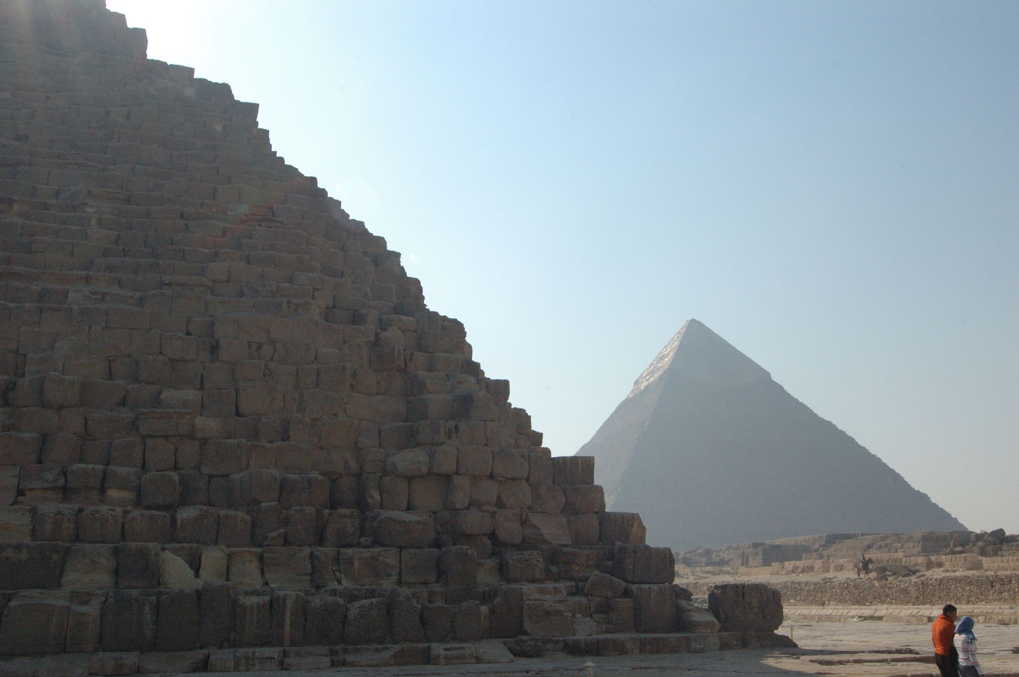 Piramide di Cheope e Piramide di Chephren.